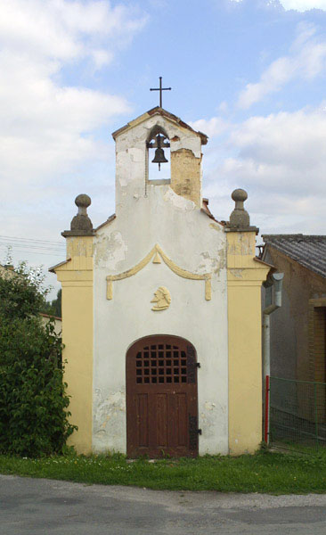 Kaplička s reliéfem Mistra Jana Husa v Kopidle.